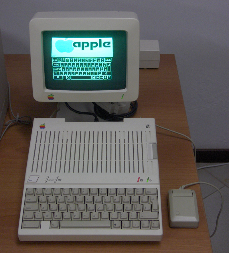 Elaboratore Apple IIc in funzione - floppy di presentazione